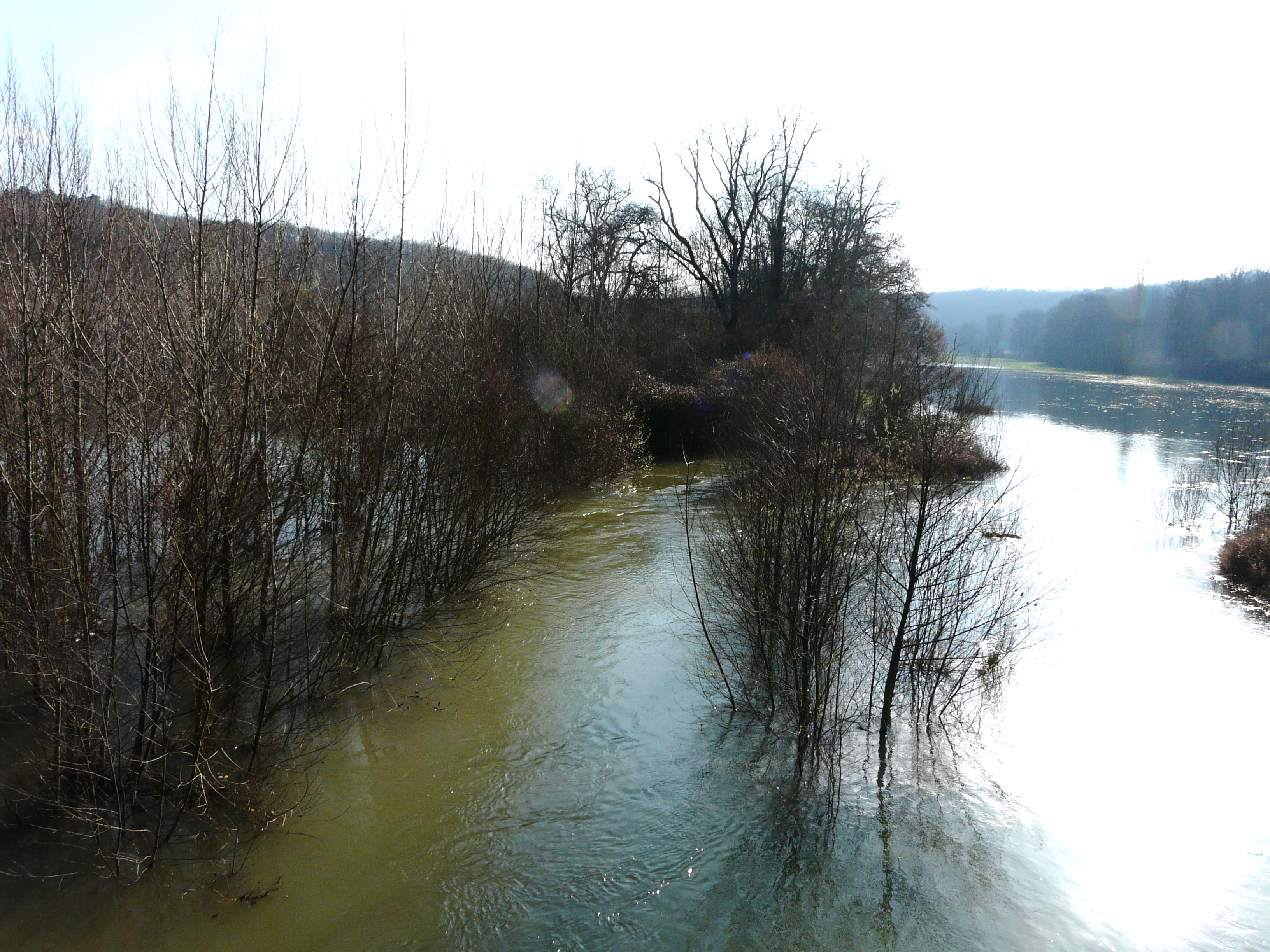 Crue du Caudeau en amont de la route nationale 21 (contournement oriental de Bergerac), commune de Creysse, Dordogne, France. Le cours principal habituel se situe entre les deux rangées d'arbres.